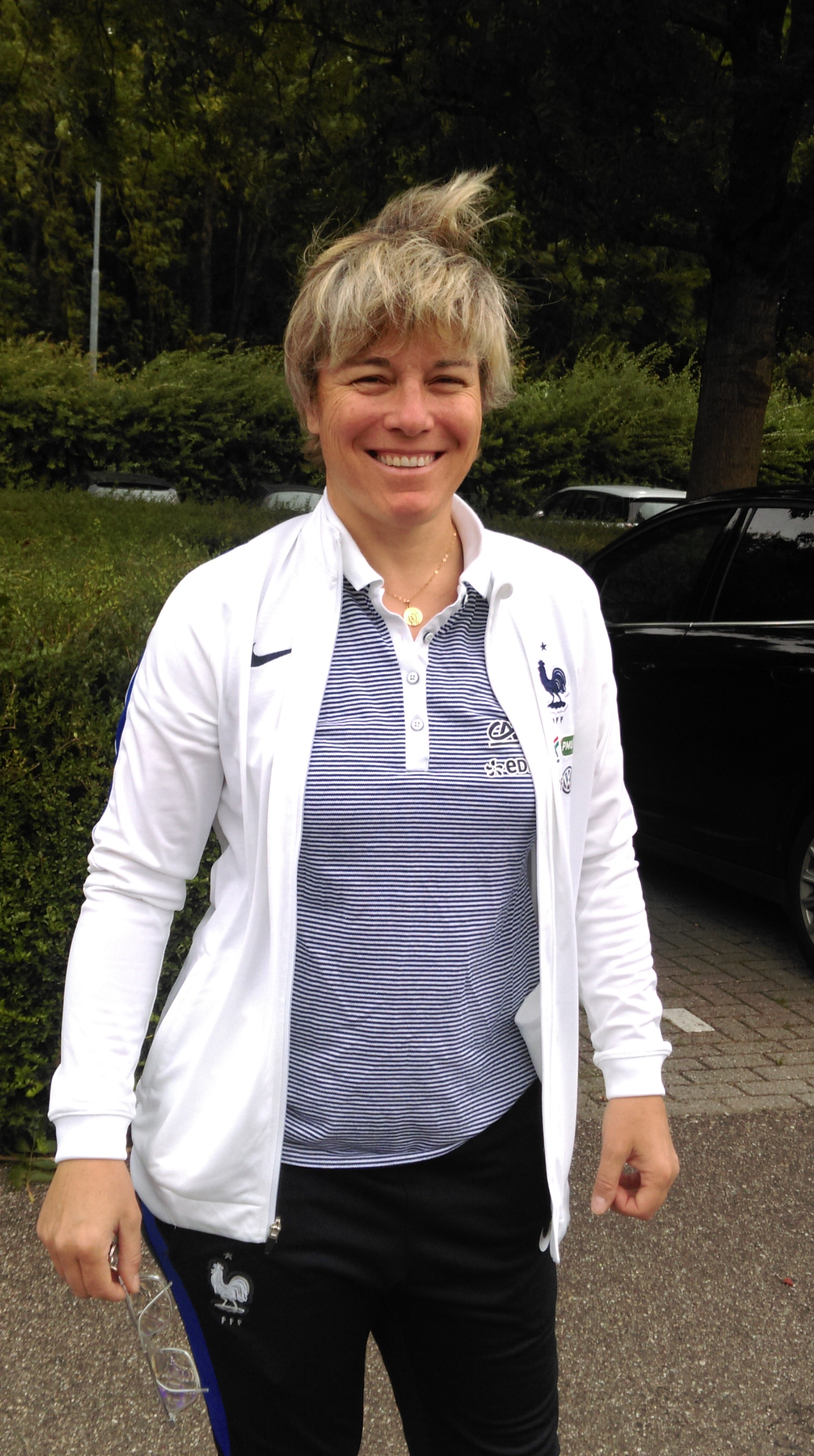 Cécile Locatelli vor dem französischen Teamquartier bei der wEuro 2017